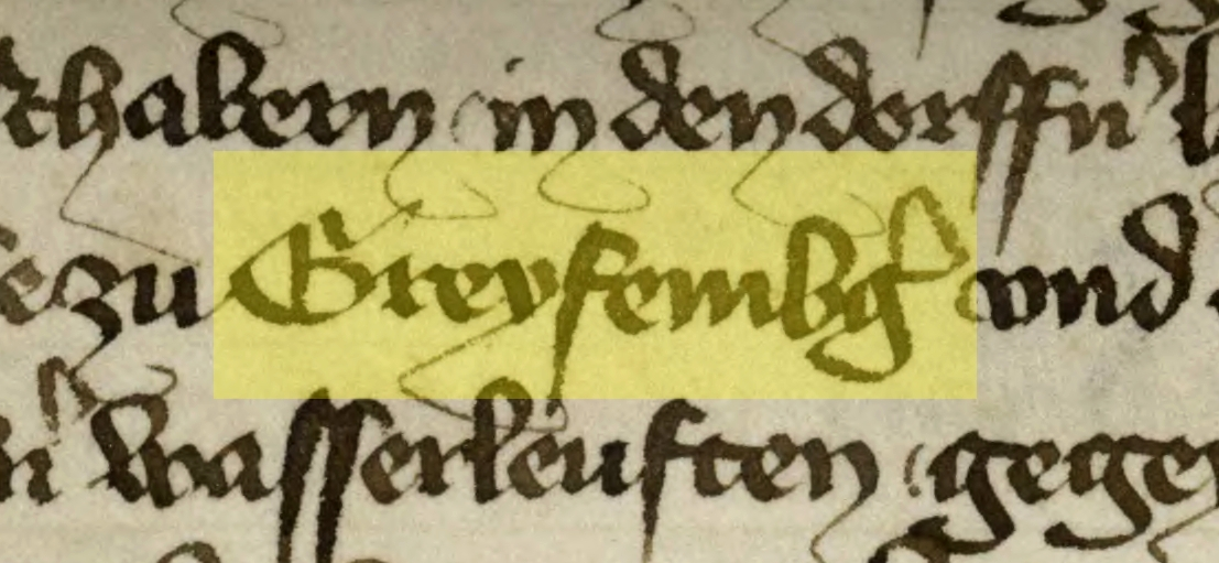 Dokument Wenzels von Luxemburg aus dem Jahr 1384 in dem u.a. der Ort Greiffenberg (als Greyfembg.) erwähnt wird.